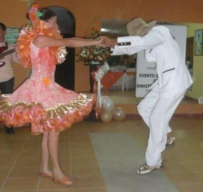 Duvan Montoya y Yeimy Cuestas bailando Joropo en Colombia.